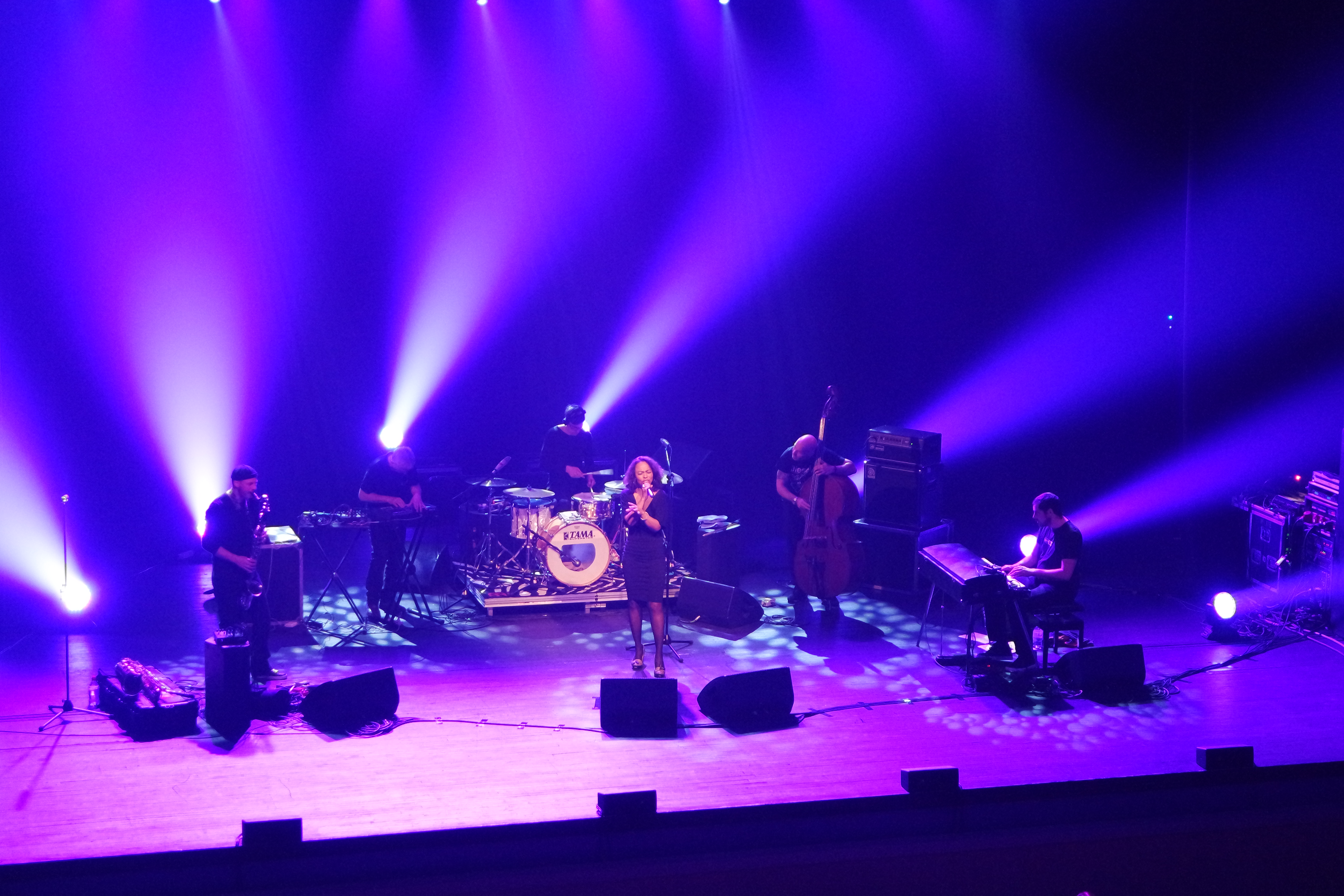 das Akustik-Set DePhazz Private live in Ventspils, Lettland am 07.04.2015. Von links nach rechts: Frank Spaniol (Bassklarinette, Baritonsaxophon, Flöte); Pit Baumgartner (Effekte); Oli Rubow (Schlagzeug, Effekte); Pat Appleton (Vocals); Markus Bodenseh (Bass); Ulf Kleiner (Fender Rhodes)